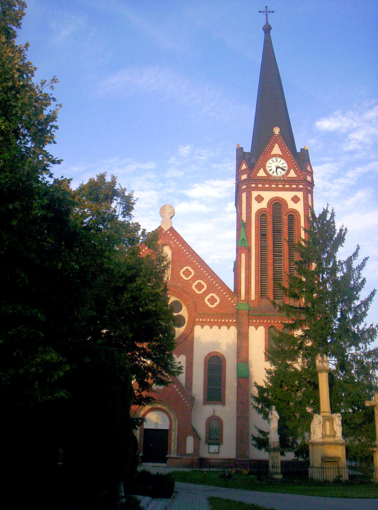 A fajszi, Szent István király tiszteletére emelt templom. Épült neoromán stílusban, 1910-ben. – photo taken by uploader User:Csanády in 2006.